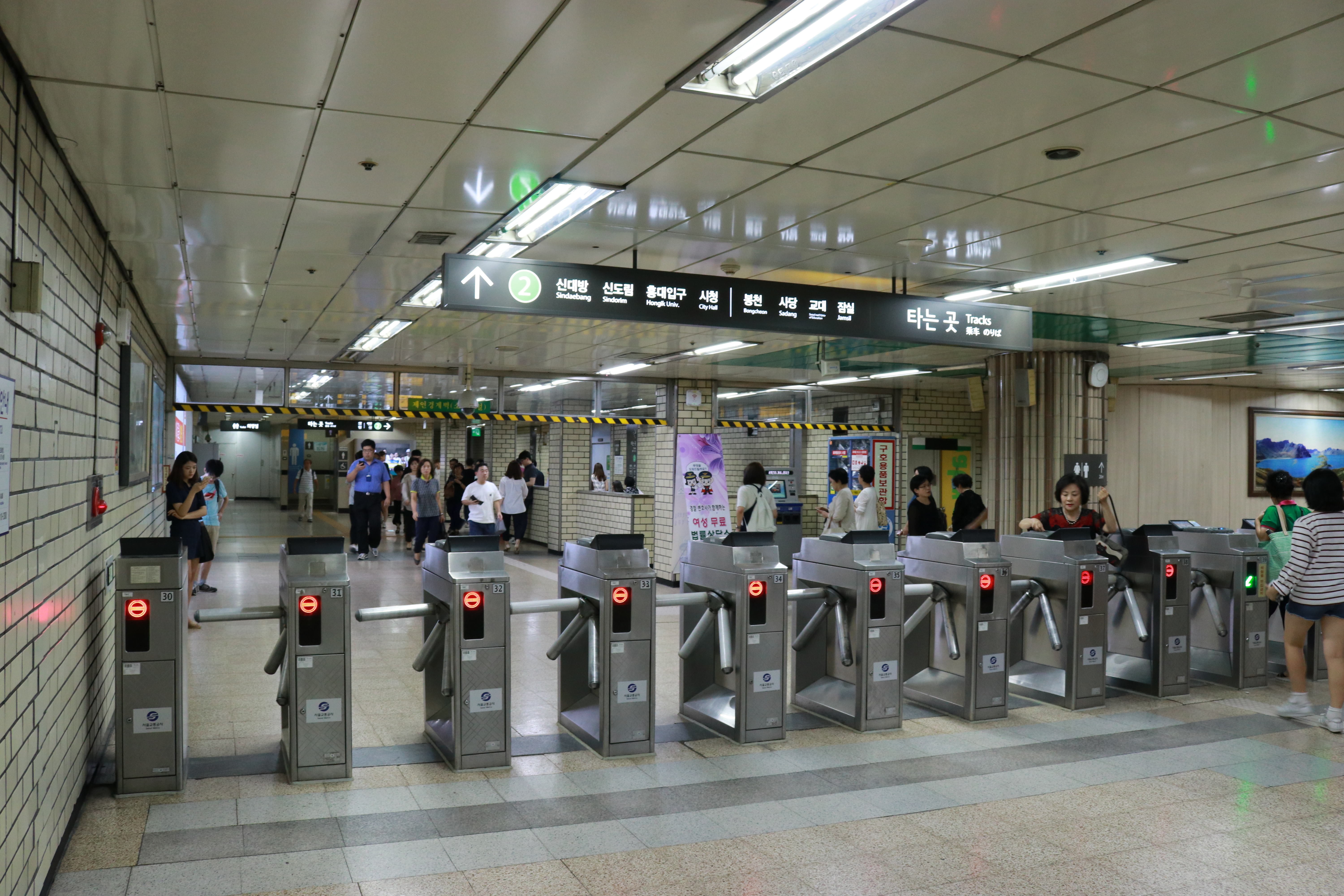 신림역 개찰구